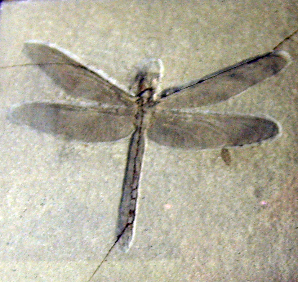 Aeschnogomphus intermedius fossil at the Museum für Naturkunde, Berlin.